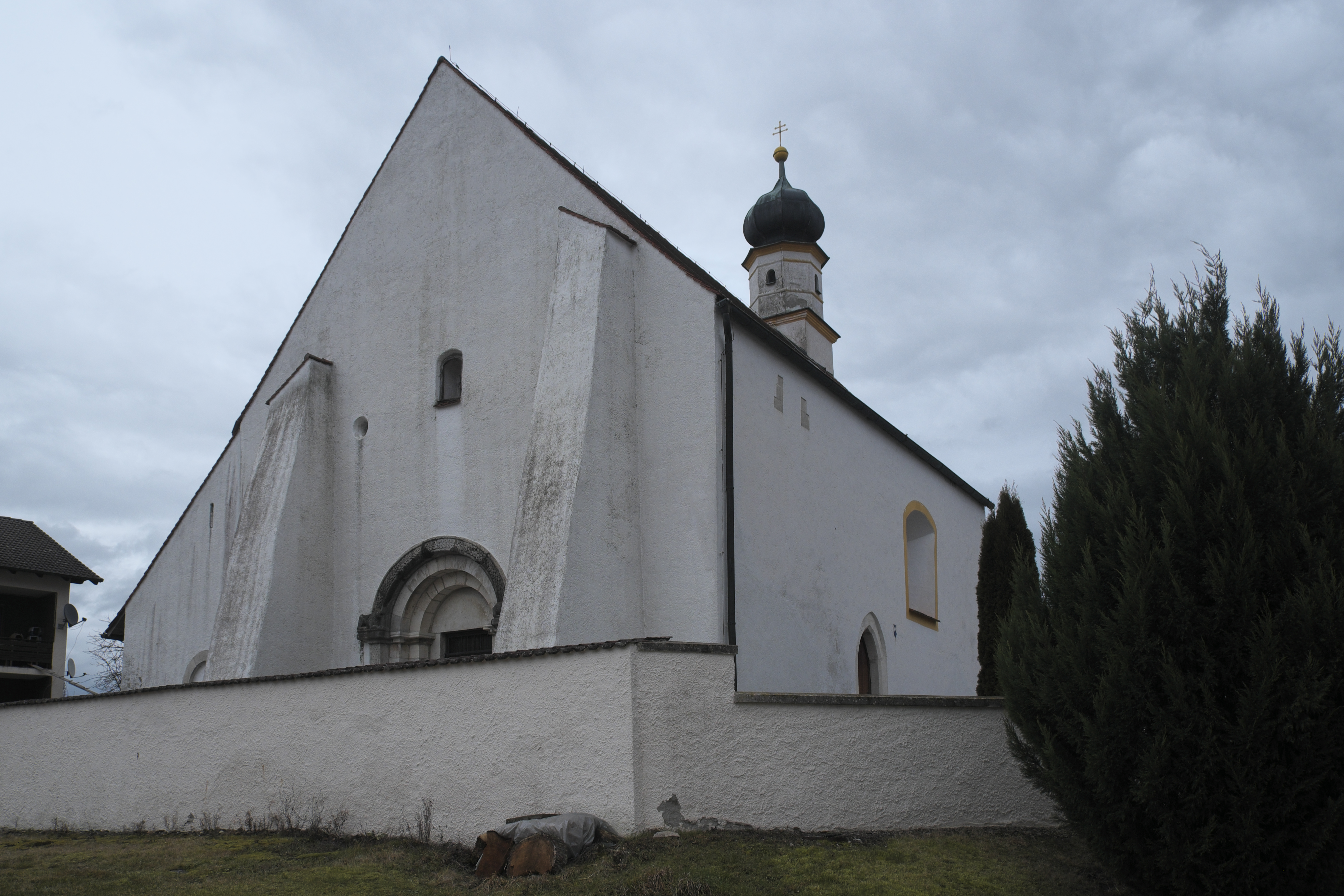 Katholische Filialkirche St. Margareta in Weißendorf (Oberdolling) im oberbayerischen Landkreis Eichstätt (Bayern/Deutschland), Westfassade